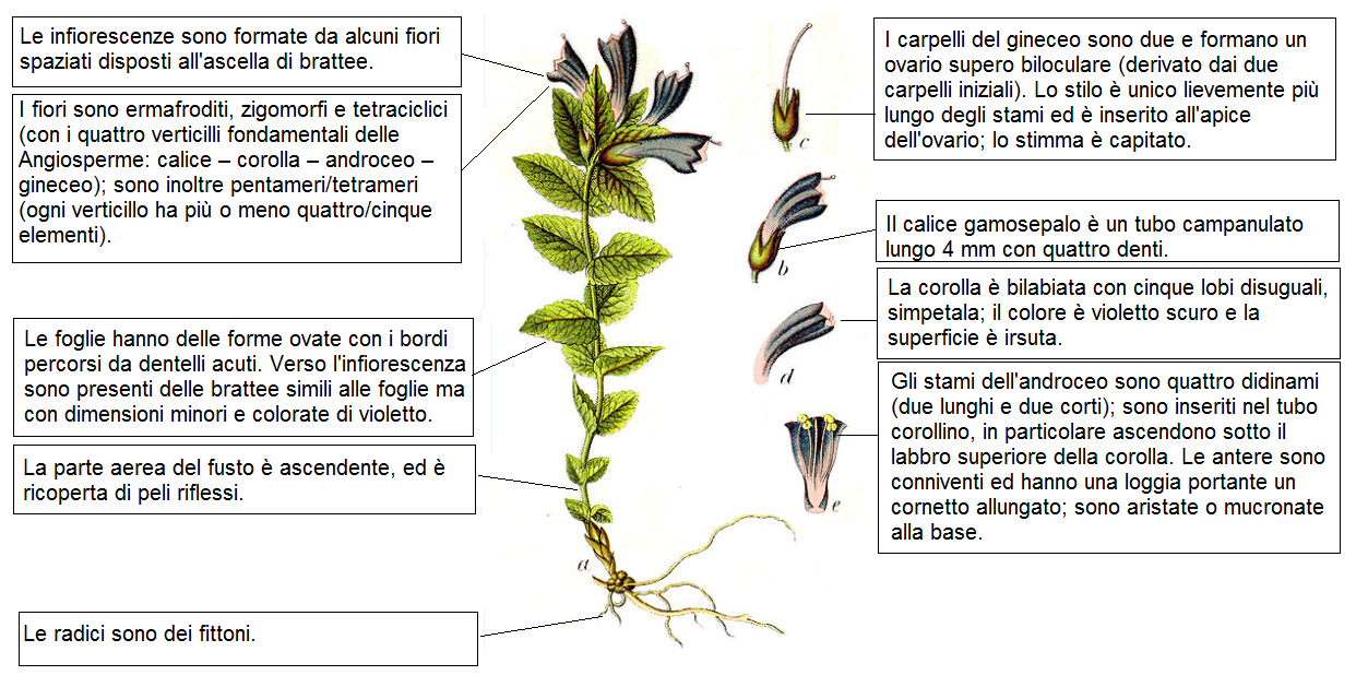 Bartsia alpina Sturm DESC